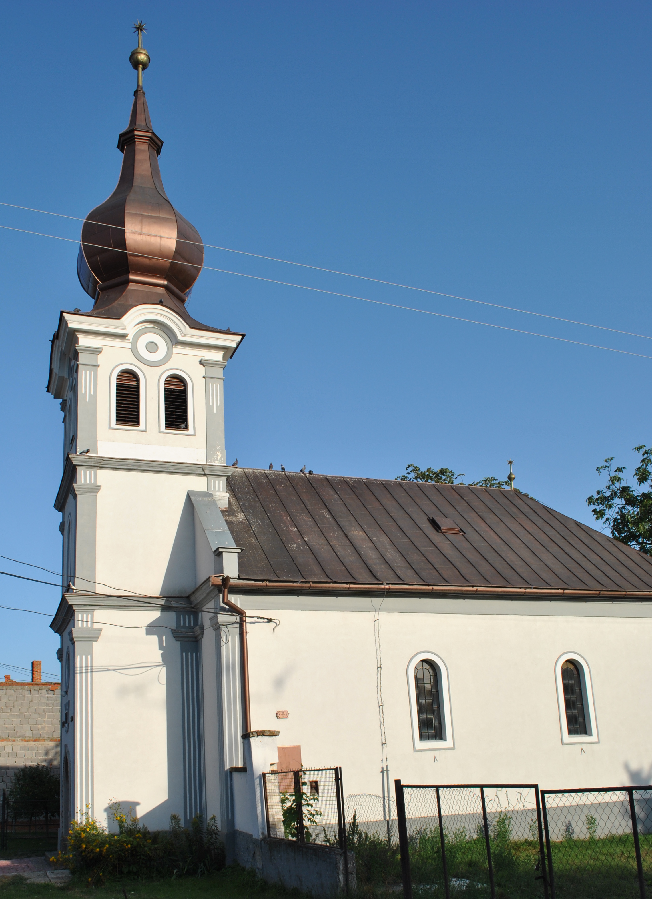 Nagyod